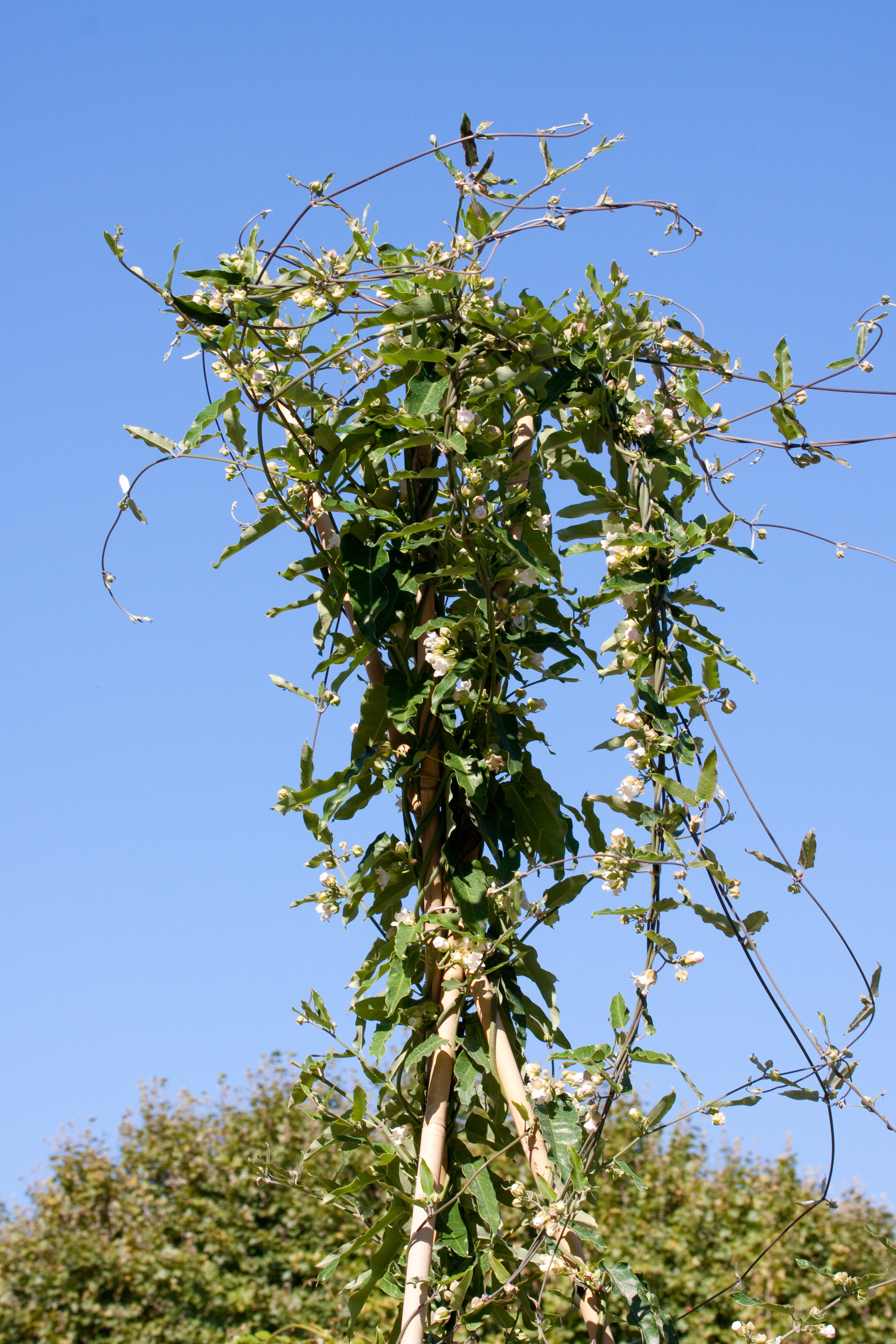 Floraison d'Araujia sericifera au Jardin des Plantes - Paris - France